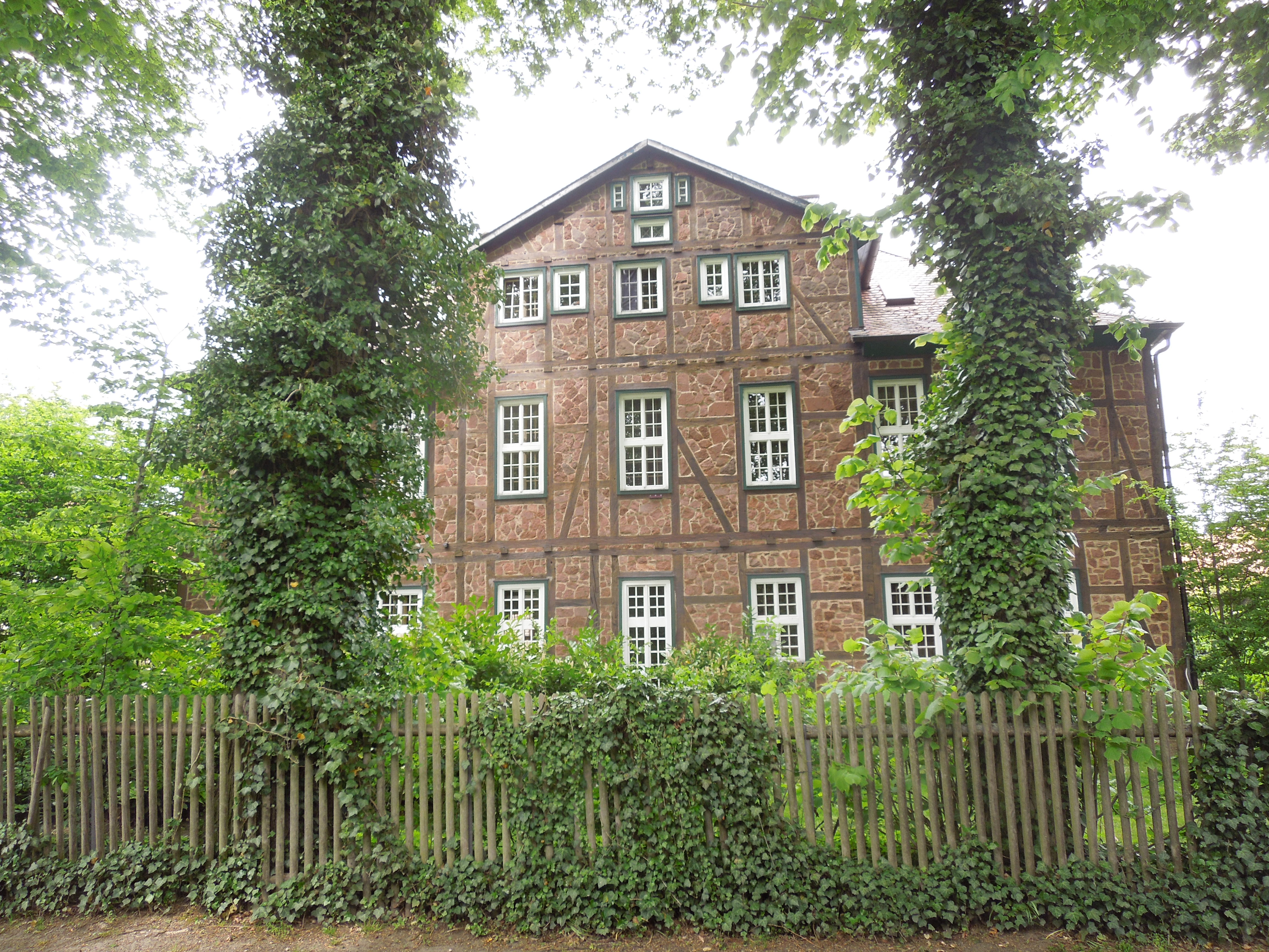 Wohnhaus auf der Kalbsburg bei Borken-Großenenglis, das ehemalige Herrenhaus